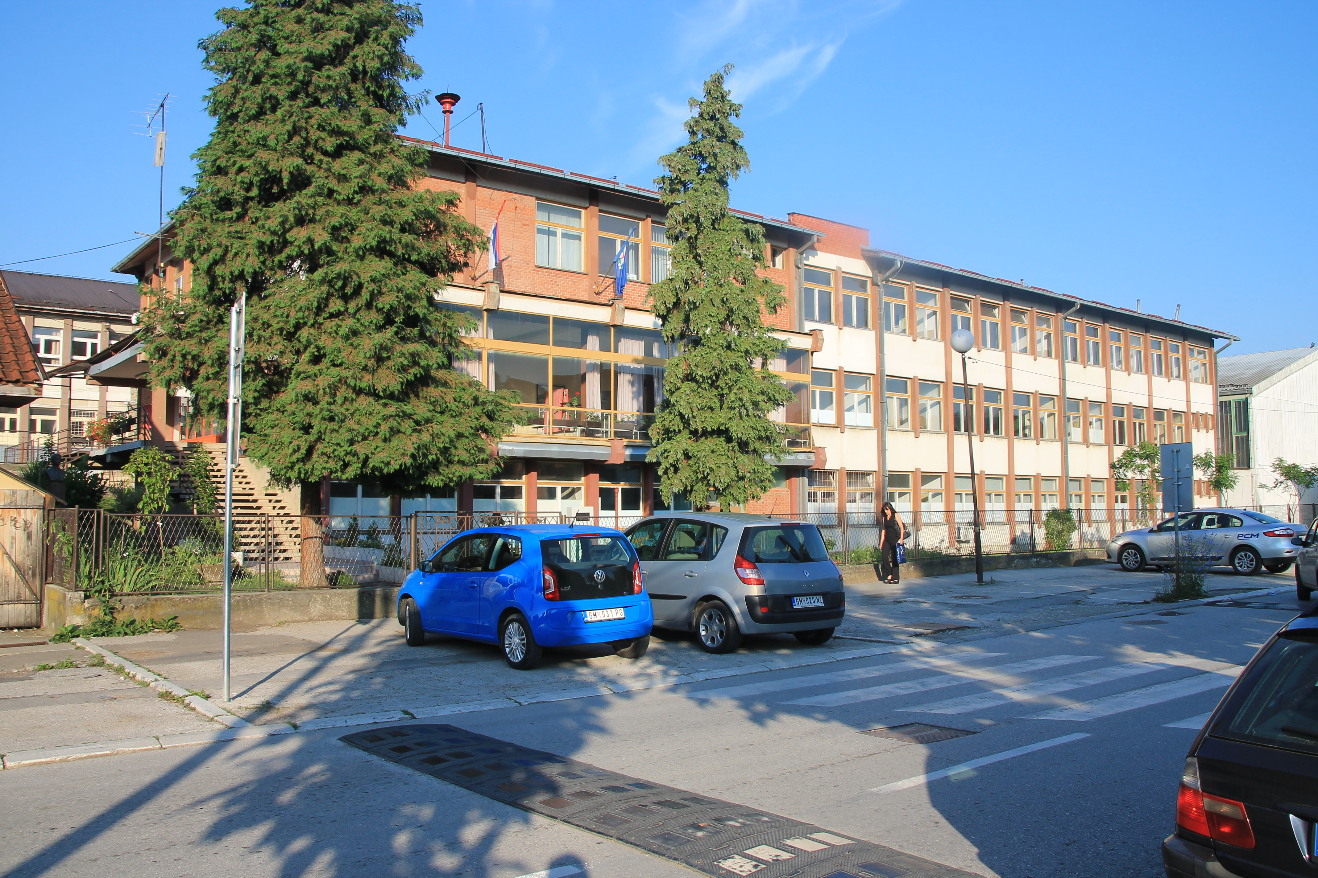 Gornji Milanovac